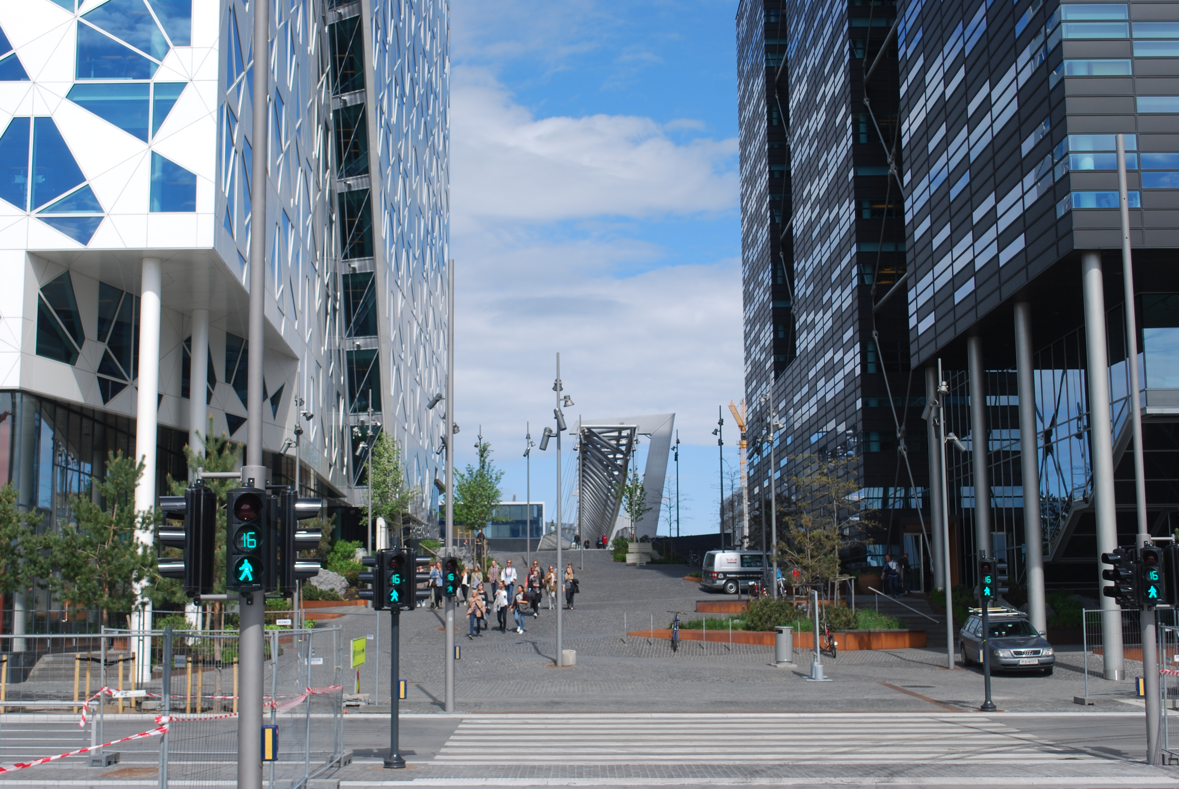 Stasjonsallmenningen, Bjørvika i Oslo, sett fra Dronning Eufemias gate mot gangbrioen Akrobaten, mai 2014. Bygninger i Barcode